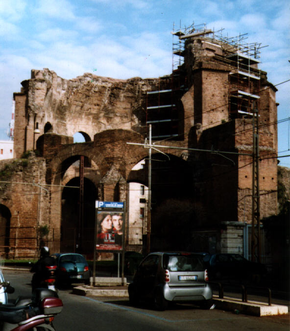 Foto des so genannten 'Tempels der Minerva Medica' in Rom. Copyright Status: GNU Freie Dokumentationslizenz